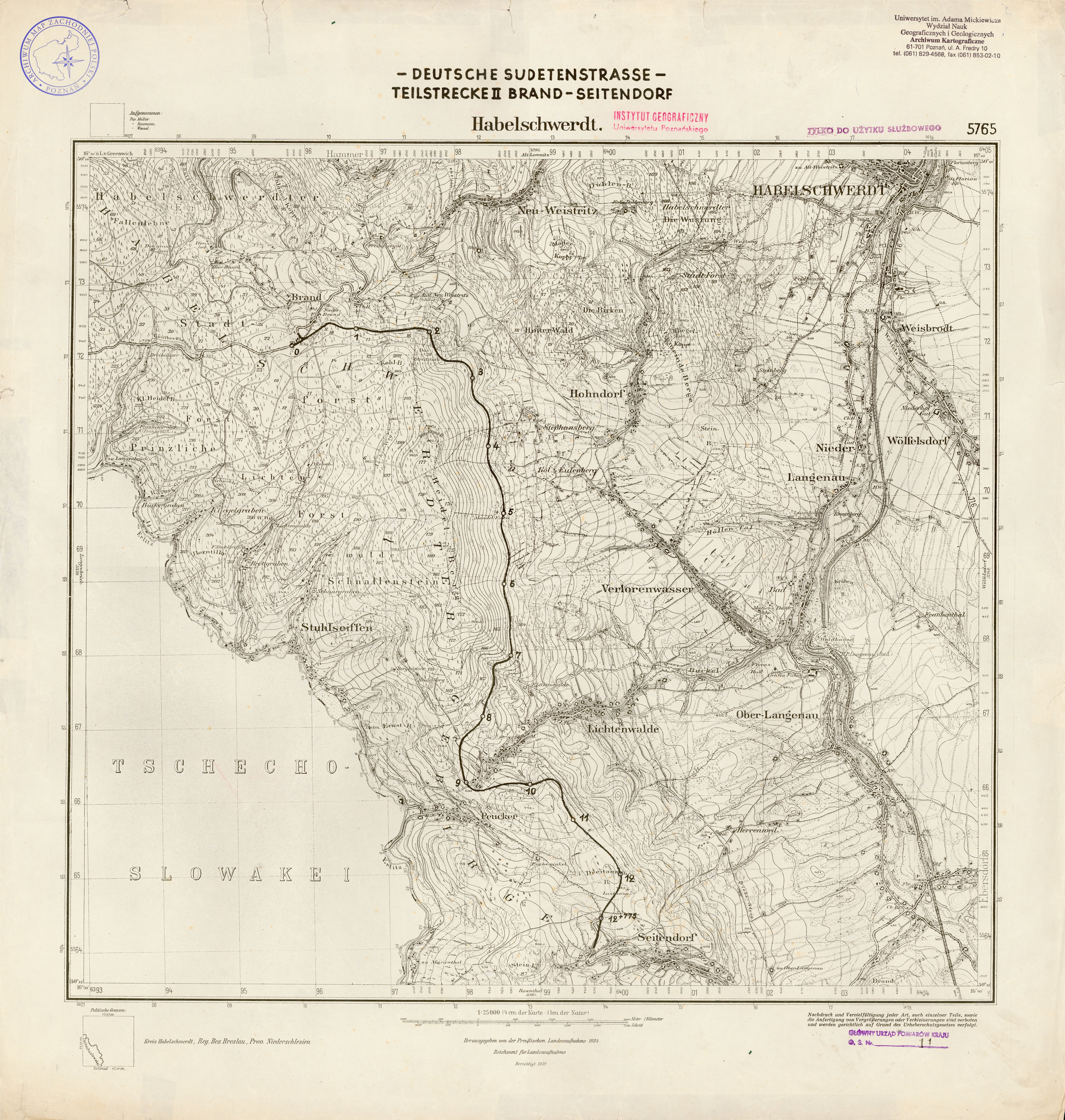 Landkarte Deutsche Sudetenstrasse - Teilstrecke Brand - Seitendorf / Habelschwerdt / Kreis Habelschwerdt, Reg. Bez. Breslau, Prov. Niederschlesien 1:25000; 1884, berichtigt 1919.